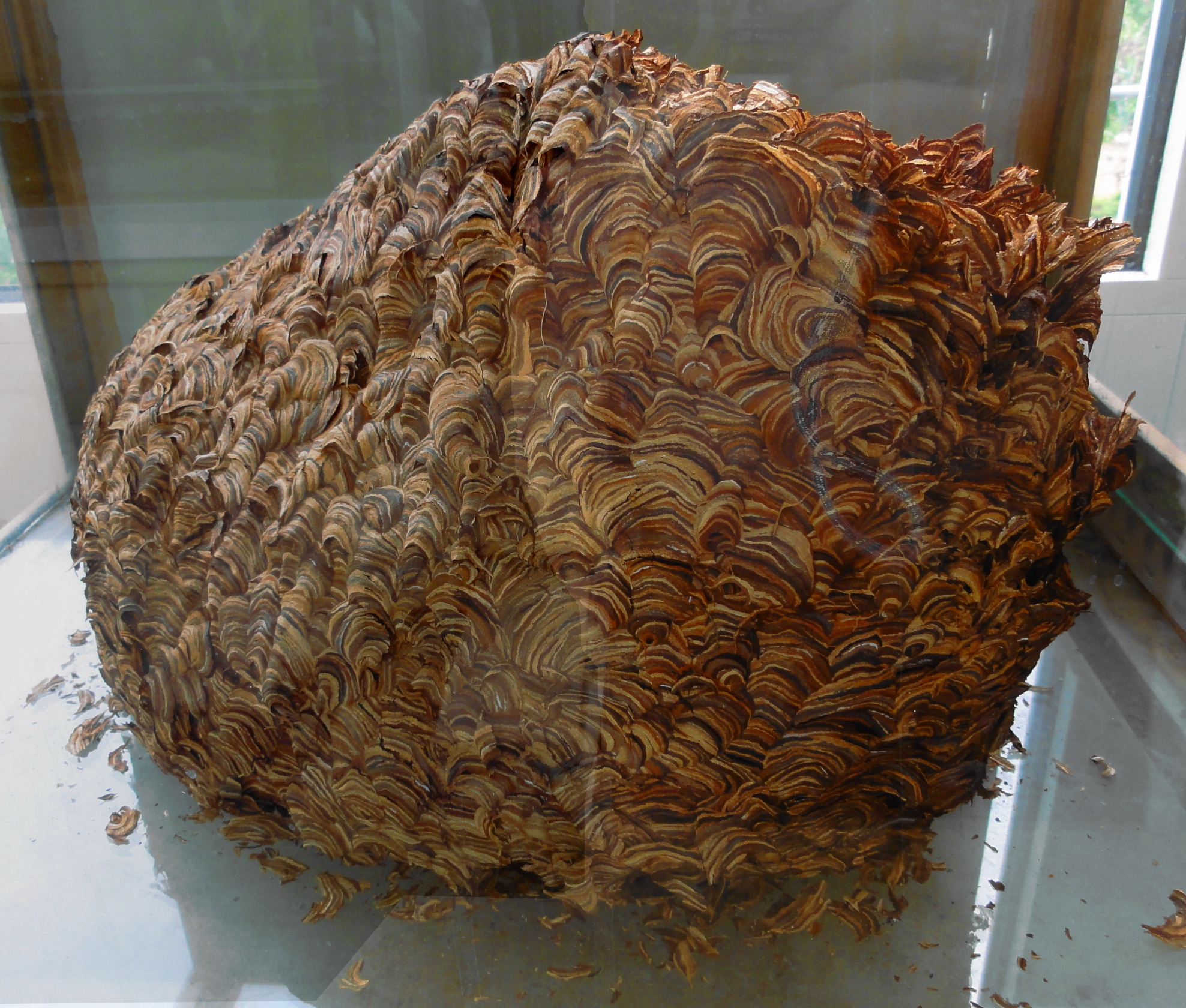 Vespula germanica nest